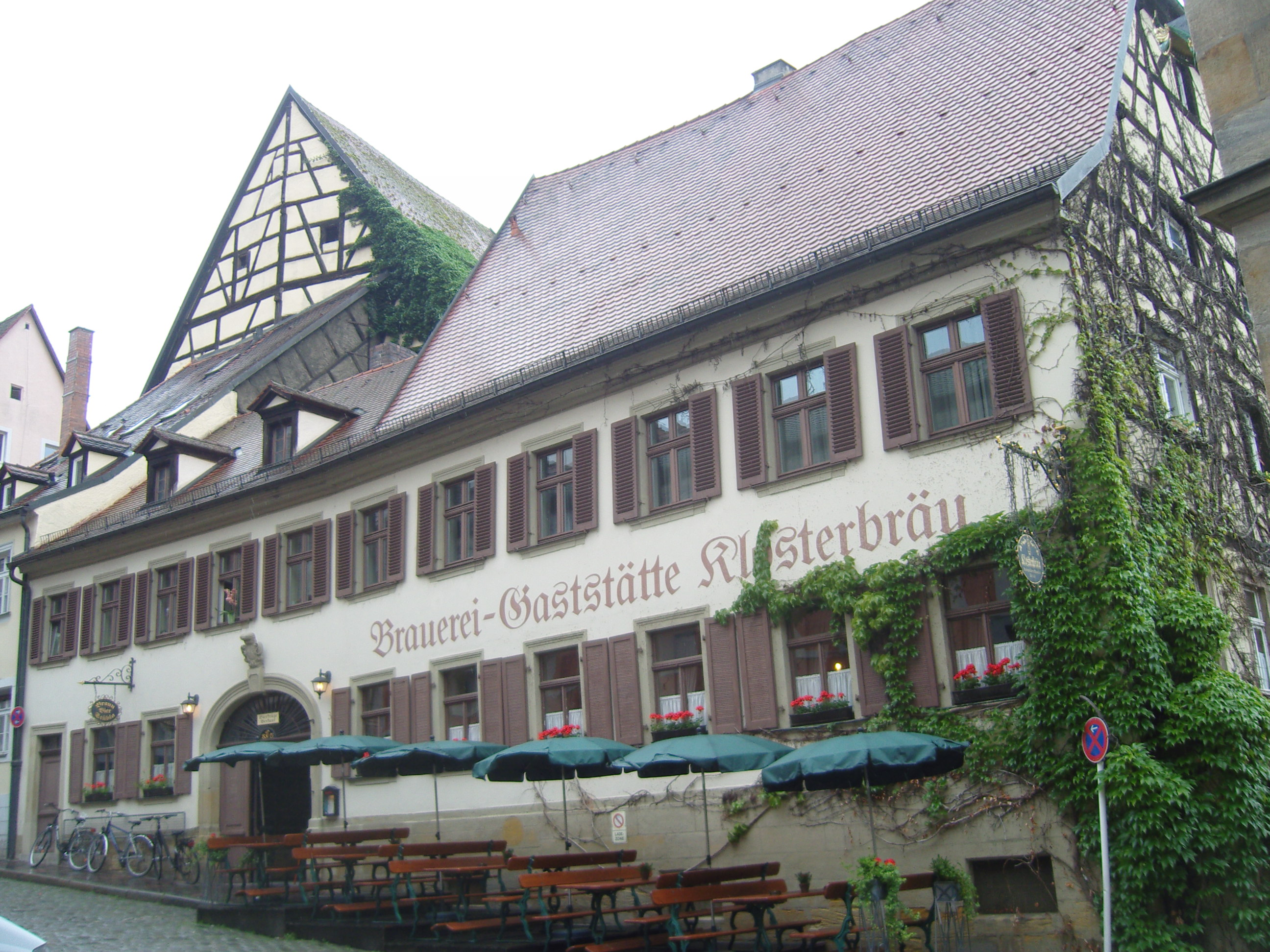 Denkmalgeschütztes ehem. fürstbischöfliches Braubierhaus; Obere Mühlbrücke 1-3; Ausgang des Lagers zur Concordiastraße Sitz von Klosterbräu BambergThis is a photograph of an architectural monument.